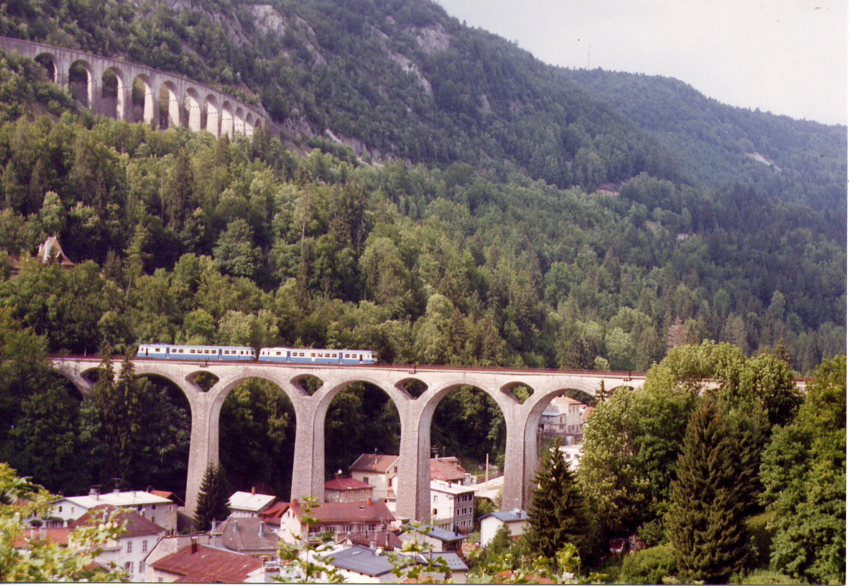 Les viaducs de Morez (Jura - France)